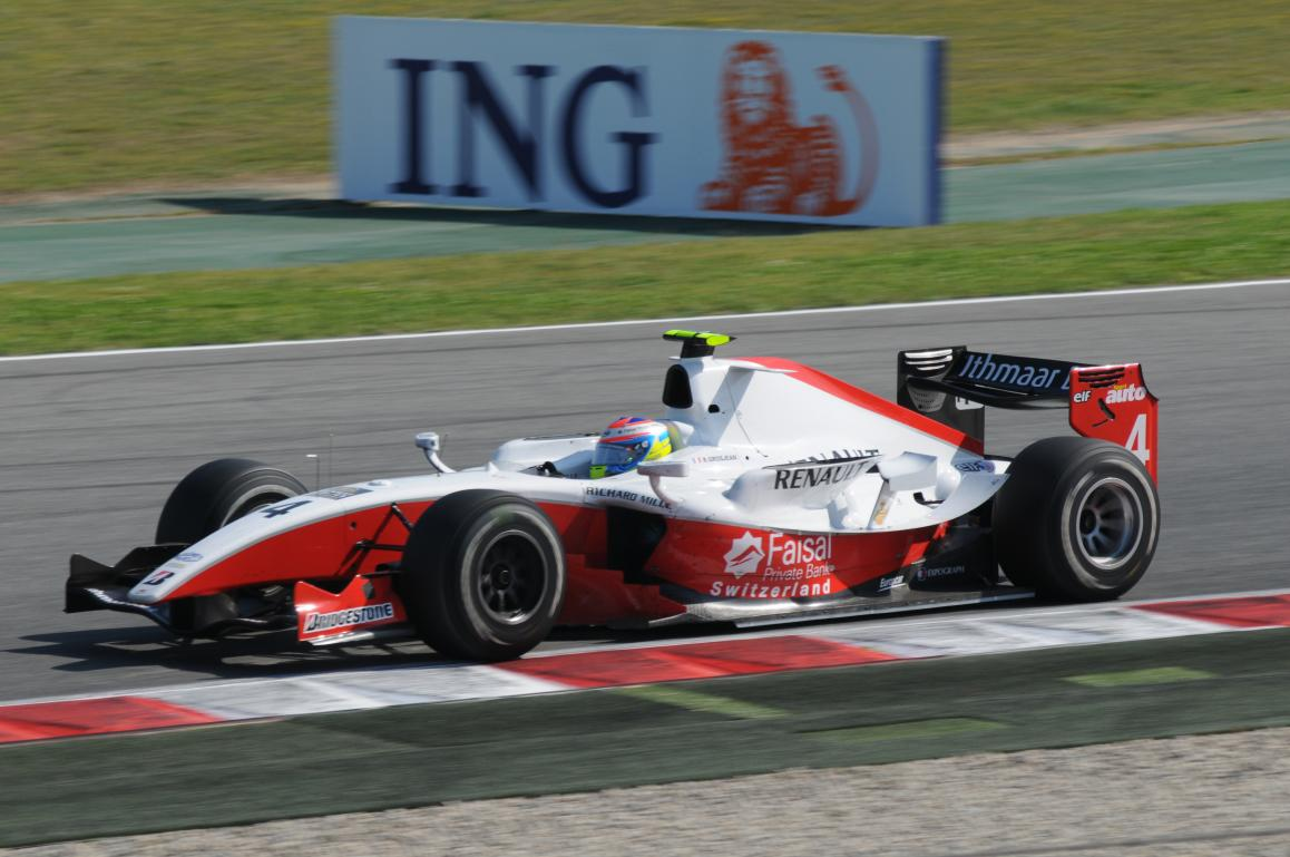 Romain Grosjean im ART GP2 während des Rennens in Spanien 2008